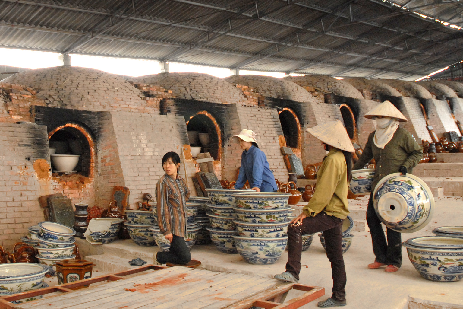 La cuisson d’une céramique se singularise par son irréversibilité absolue. Avant d’être décorés, les objets subissent une première cuisson dite de « dégourdi » (à 900°C), dont le but est de sécher l’objet déjà façonné, avant d’être émaillé. La cuisson de la porcelaine dure doit atteindre 1400°C. Dès le XVIIIe siècle, on élabore des fours capables d’atteindre cette température. A partir des années 1850 on alimente les fours avec du charbon. Dans les années 1960 la cuisson au gaz se généralise en Europe. Extraits du site : Dong Trieu est un village artisanal dans le delta du fleuve rouge qui comprend plusieurs entreprises fabriquant des poteries et des céramiques.